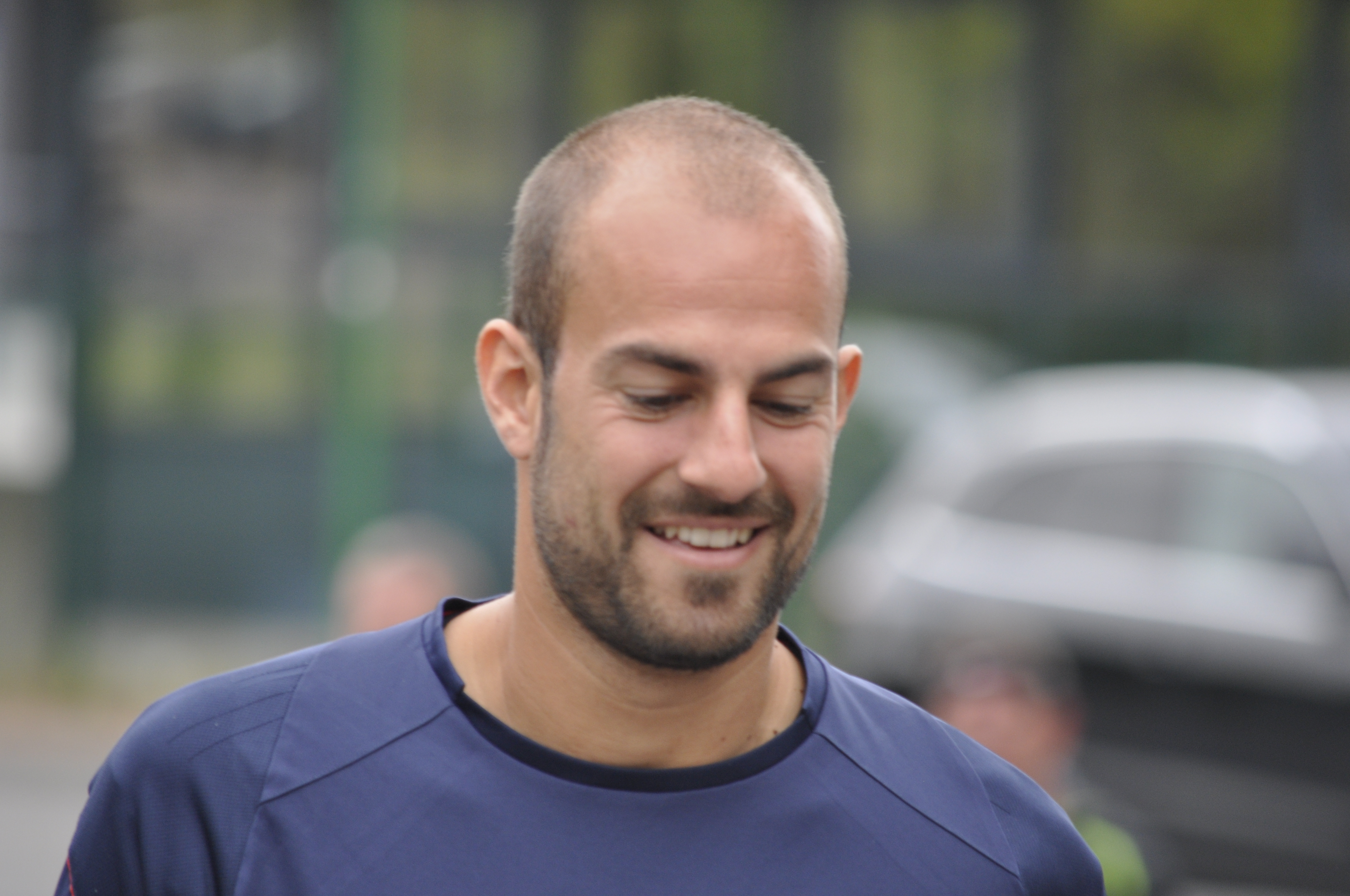 Matthieu Dreyer lors d'un entrainement du Stade Malherbe Caen